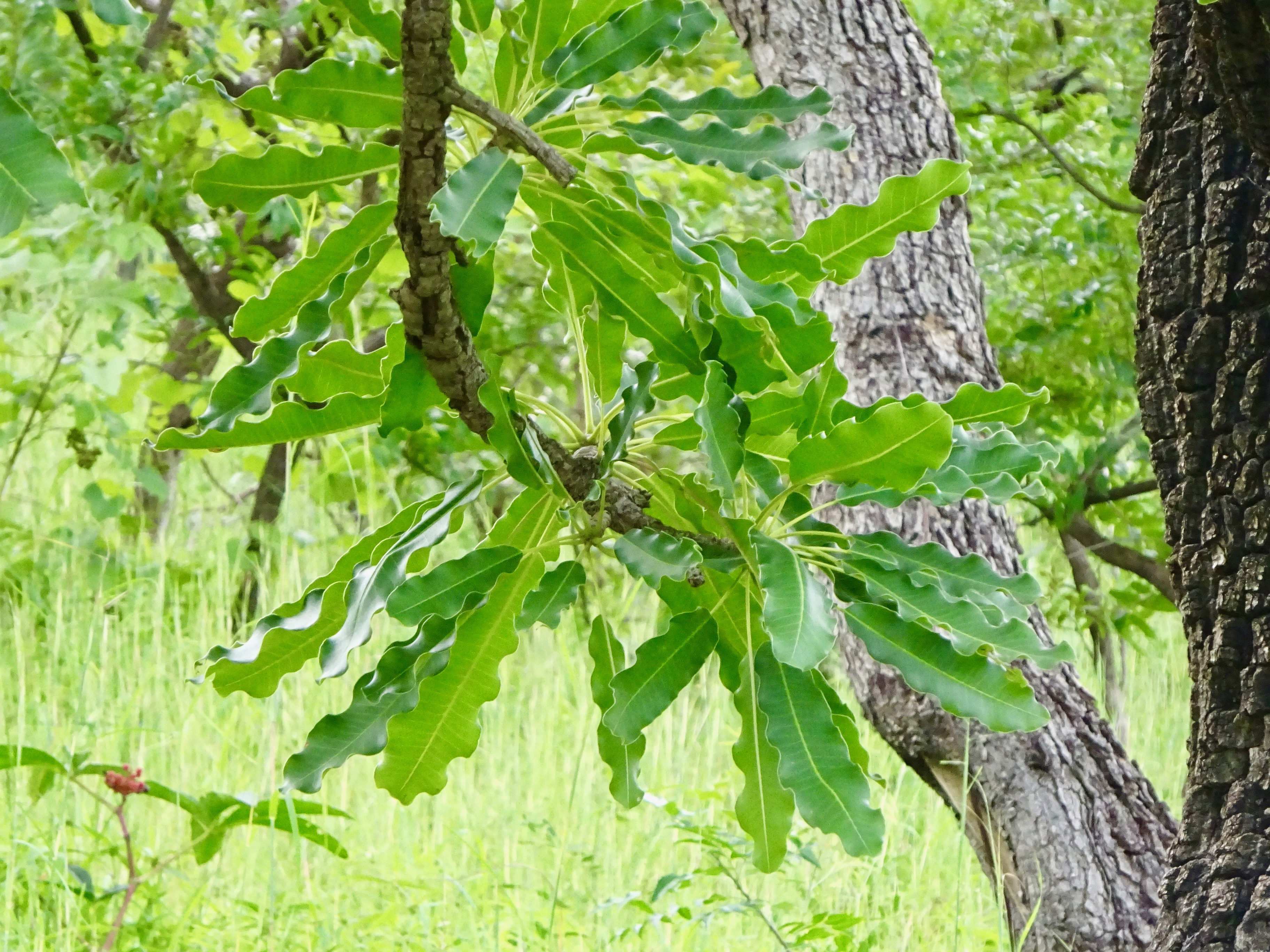 Arbre de karité situé à Tanongou, Bénin